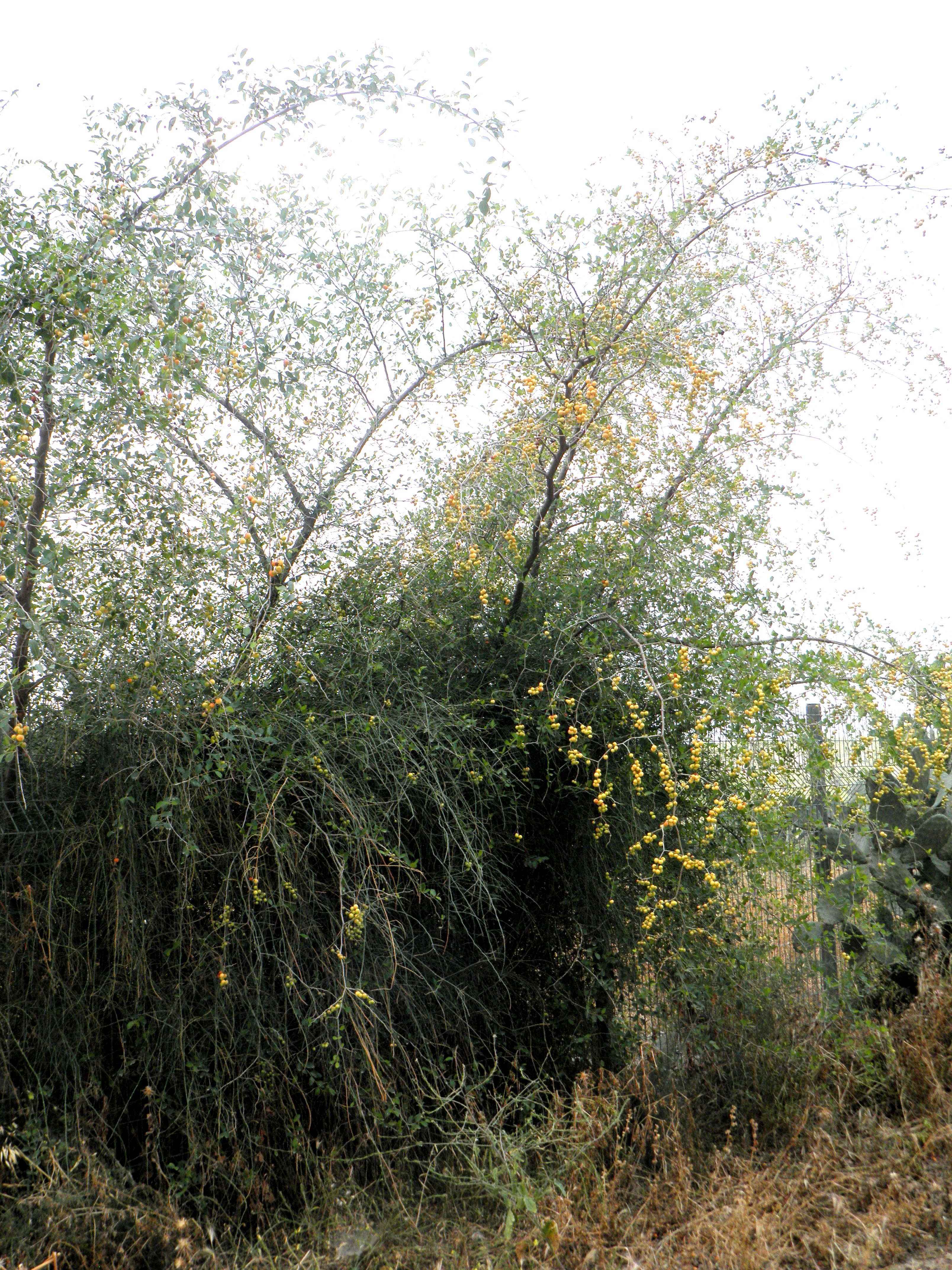 שיזף מצוי יער מודיעין